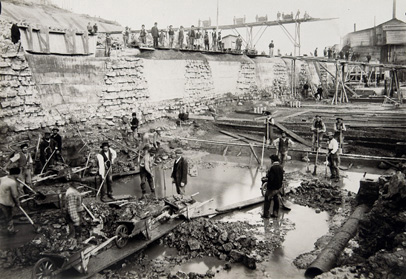 Historische Fotografie vom Bau des alten Wasserkraftwerks in Rheinfelden